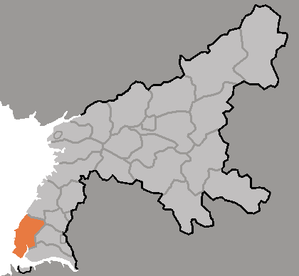 Map of Onchon, Pyongan-namdo, DPRK, 2006